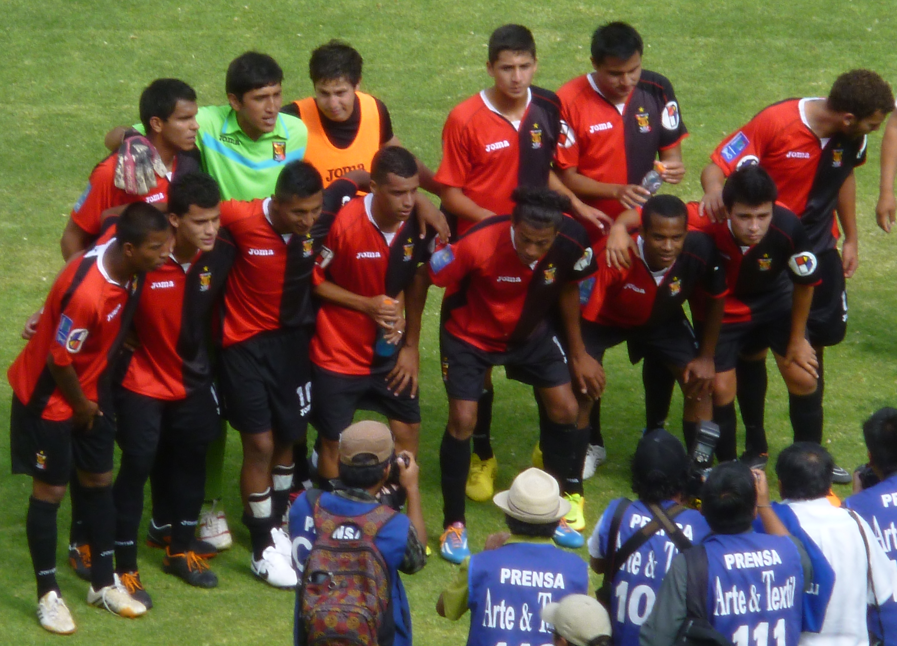 Equipo de Reservas del FBC Melgar. Campeón Nacional del Torneo de Promoción y Reserva 2014